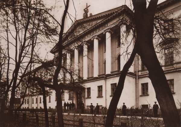 Здание Санкт-Петербургской духовной академии